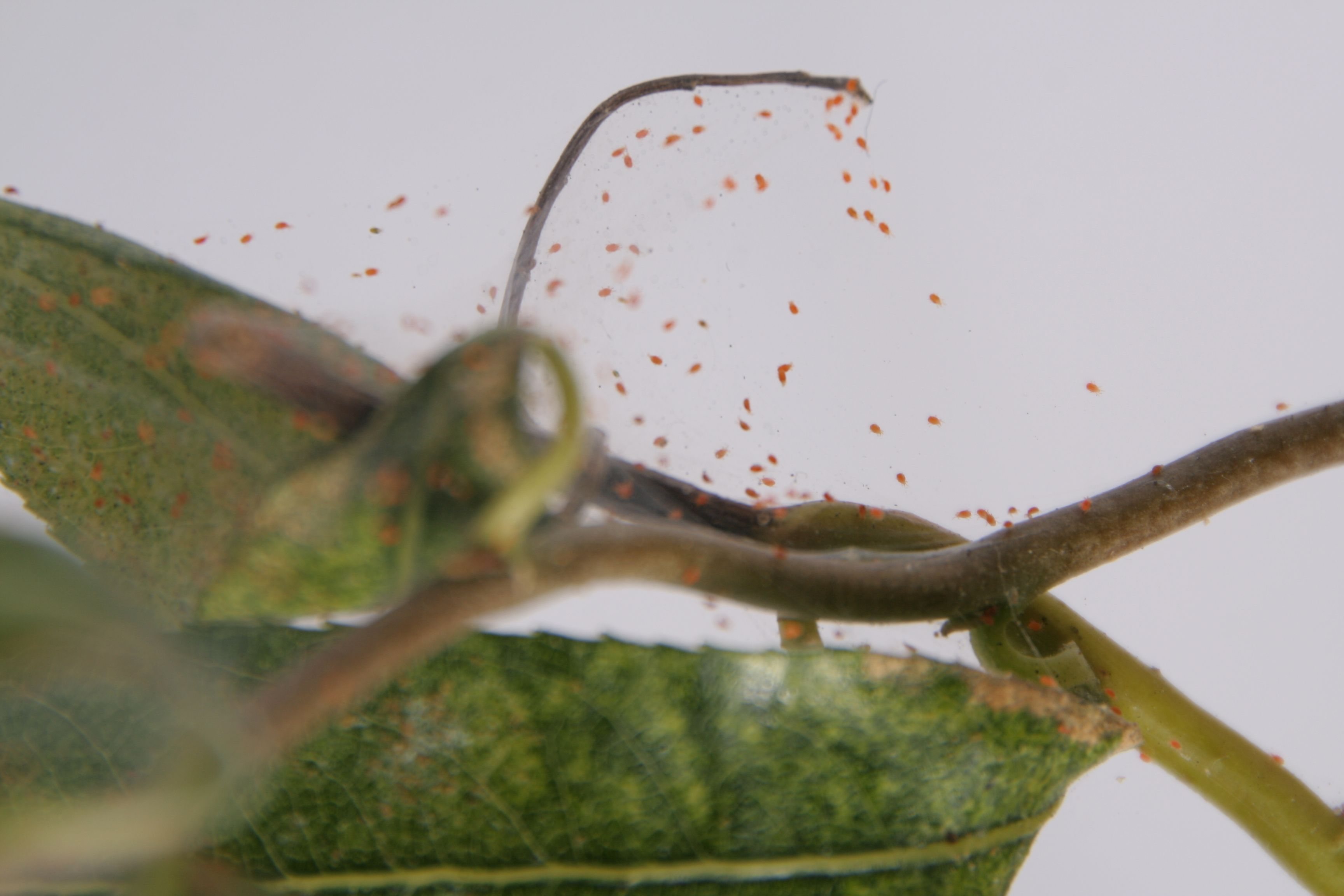 10no Design Tino Ingemann Larsen